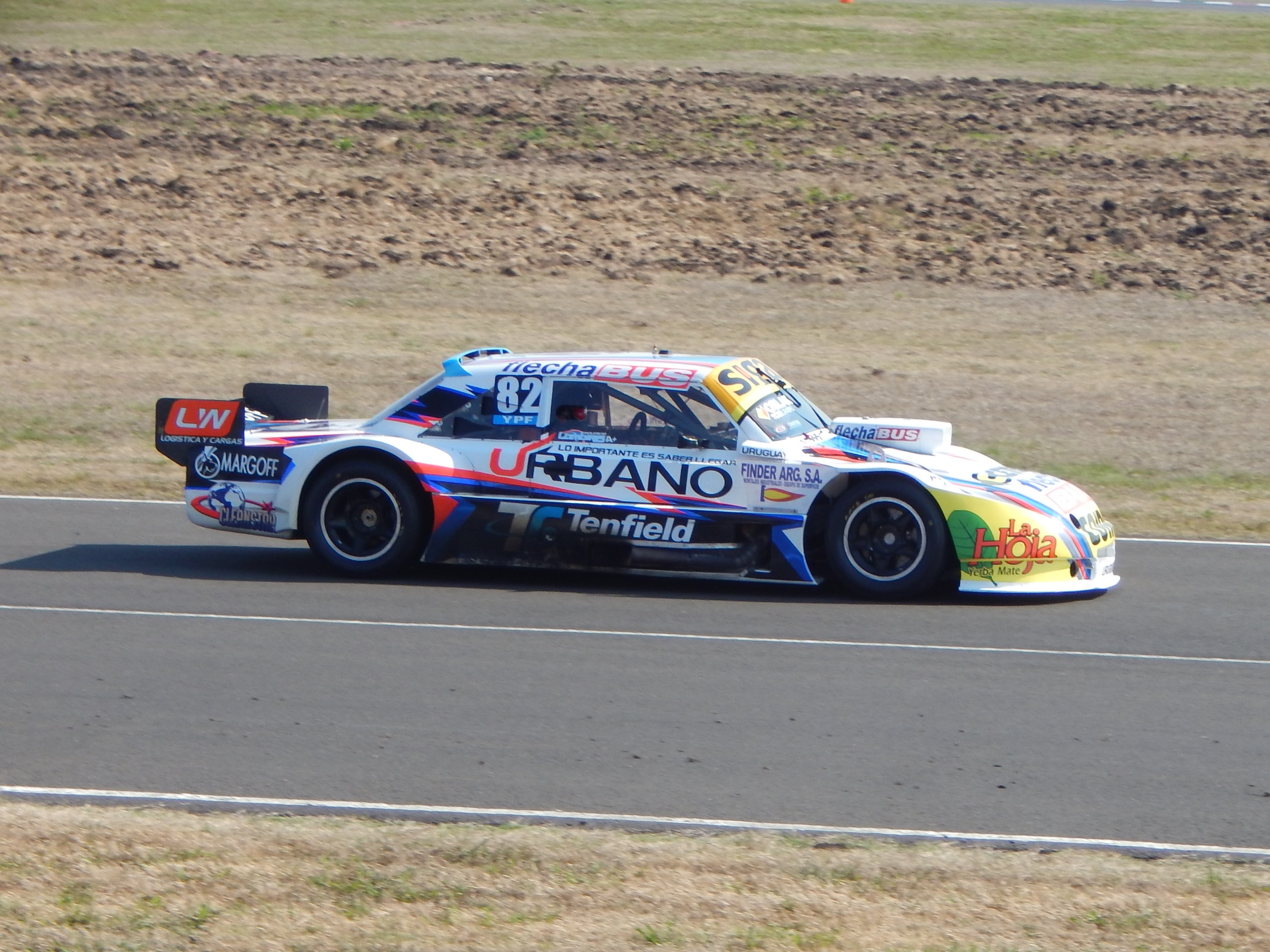 Mauricio Lambiris Paraná 2015